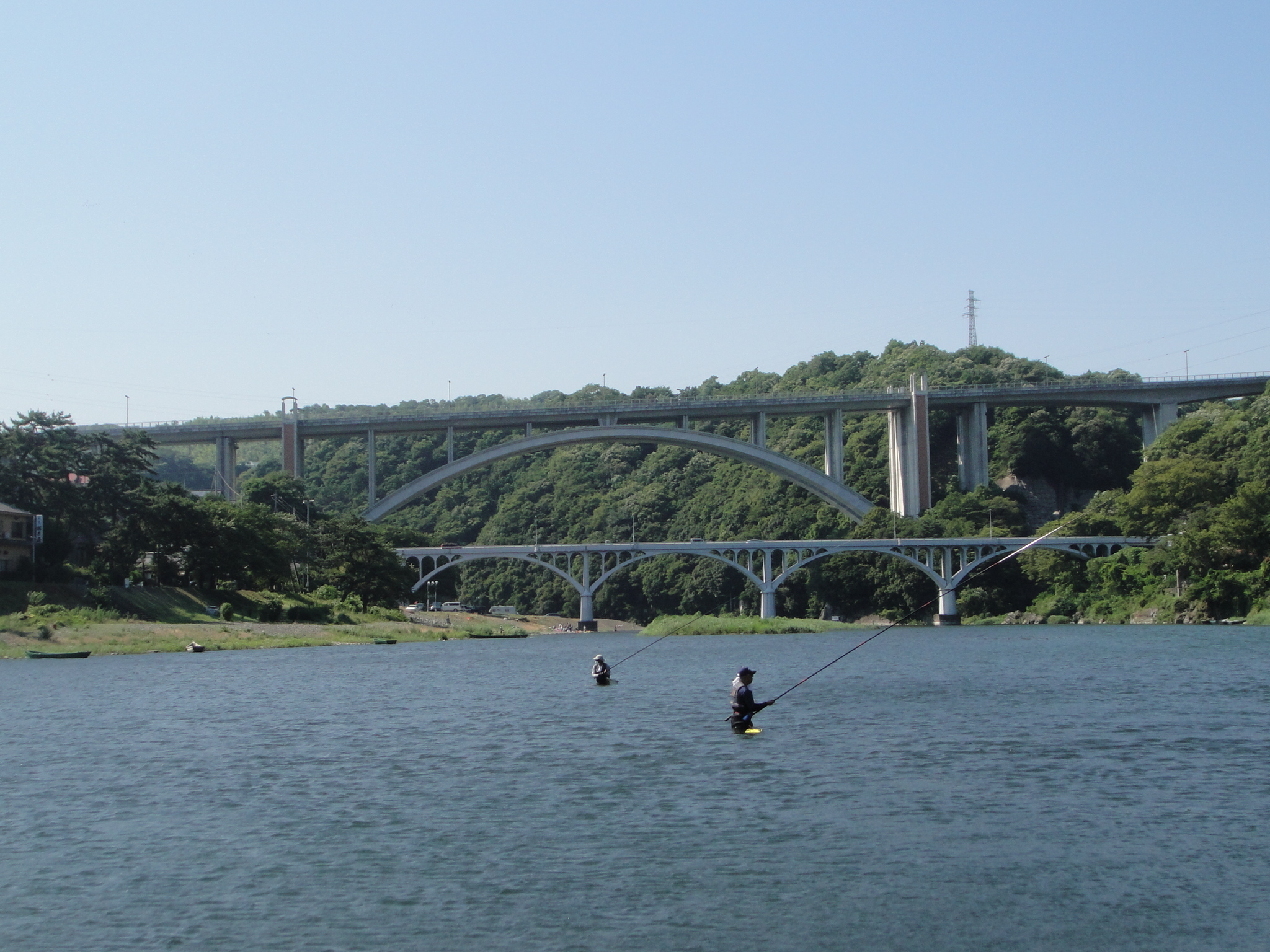 相模川に架かる小倉橋と新小倉橋